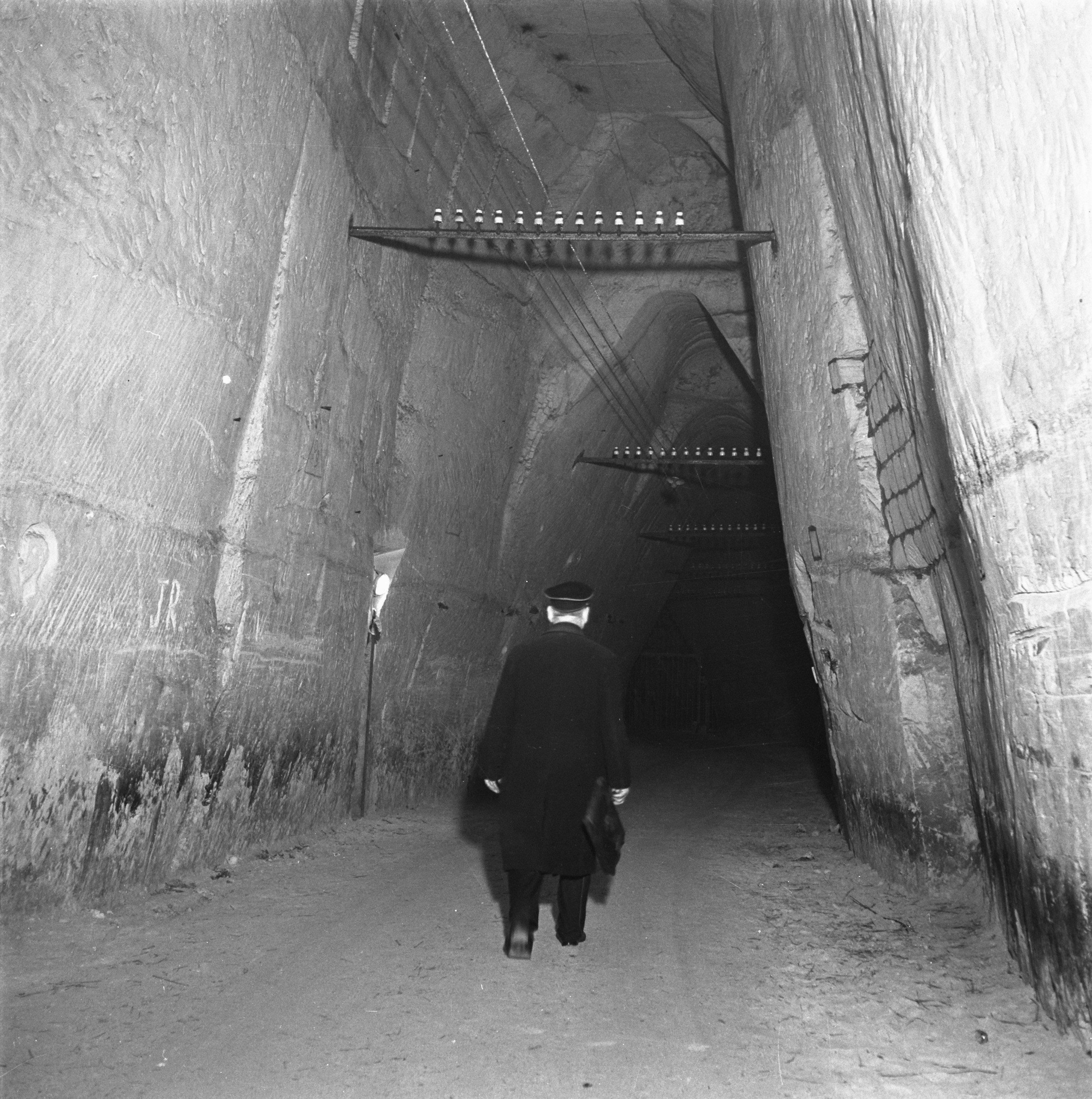 Collectie / Archief : Fotocollectie Anefo Reportage / Serie : Kunst: Kunstschatten St. Pietersberg Beschrijving : Suppoost met aktetas en uniformpet in een van de mijngangen Datum : 27 juli 1945 Locatie : Maastricht Trefwoorden : kunst, tweede wereldoorlog Fotograaf : Fotograaf Onbekend / Anefo Auteursrechthebbende : Nationaal Archief Materiaalsoort : Negatief (zwart/wit) Nummer archiefinventaris : bekijk toegang 2.24.01.03 Bestanddeelnummer : 900-2421